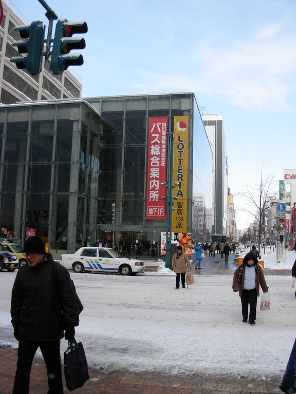 Asahikawa A'sh building A'shビル（旭川市一条通7丁目）